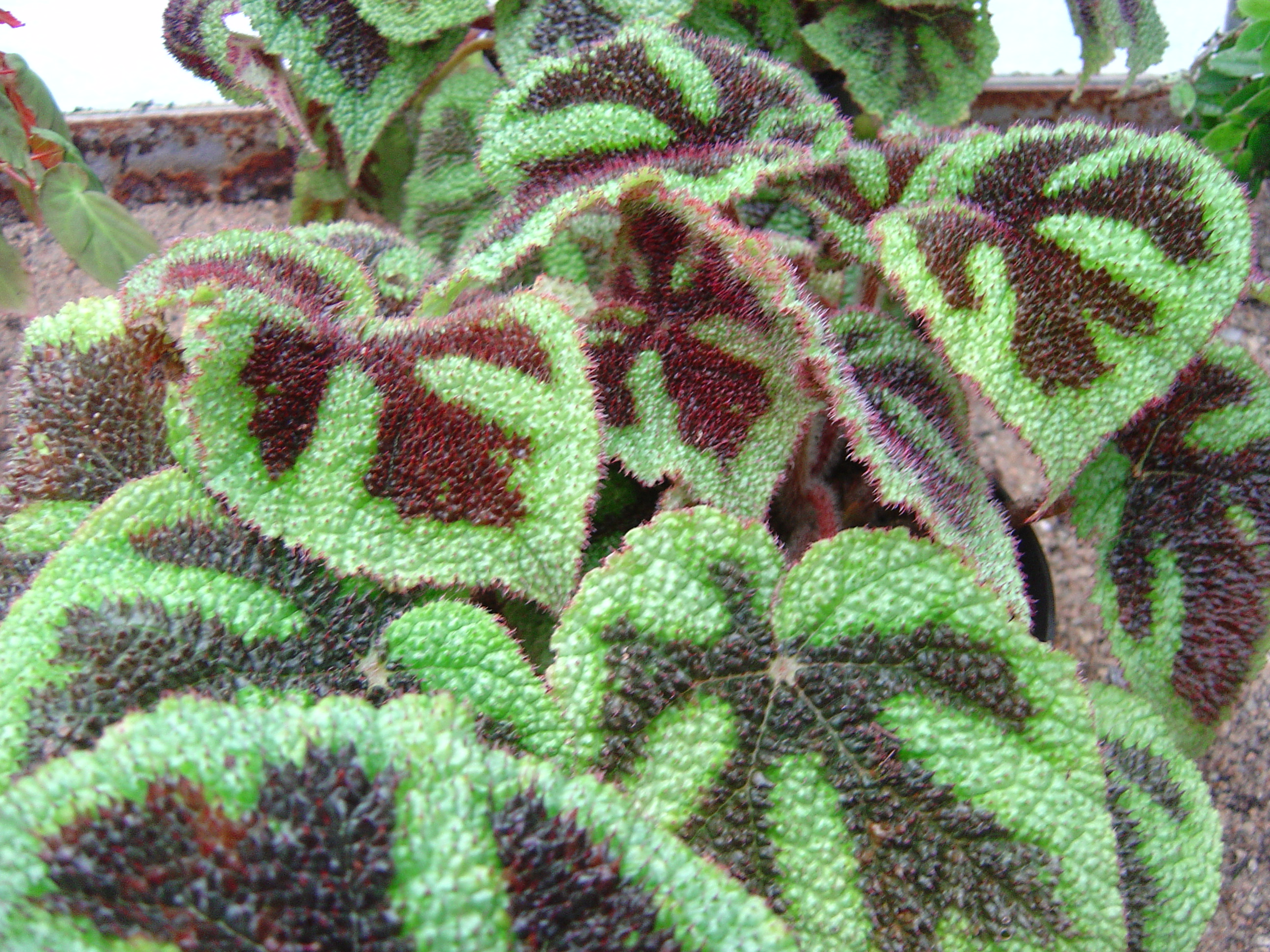 Feuilles de Begonia masoniana